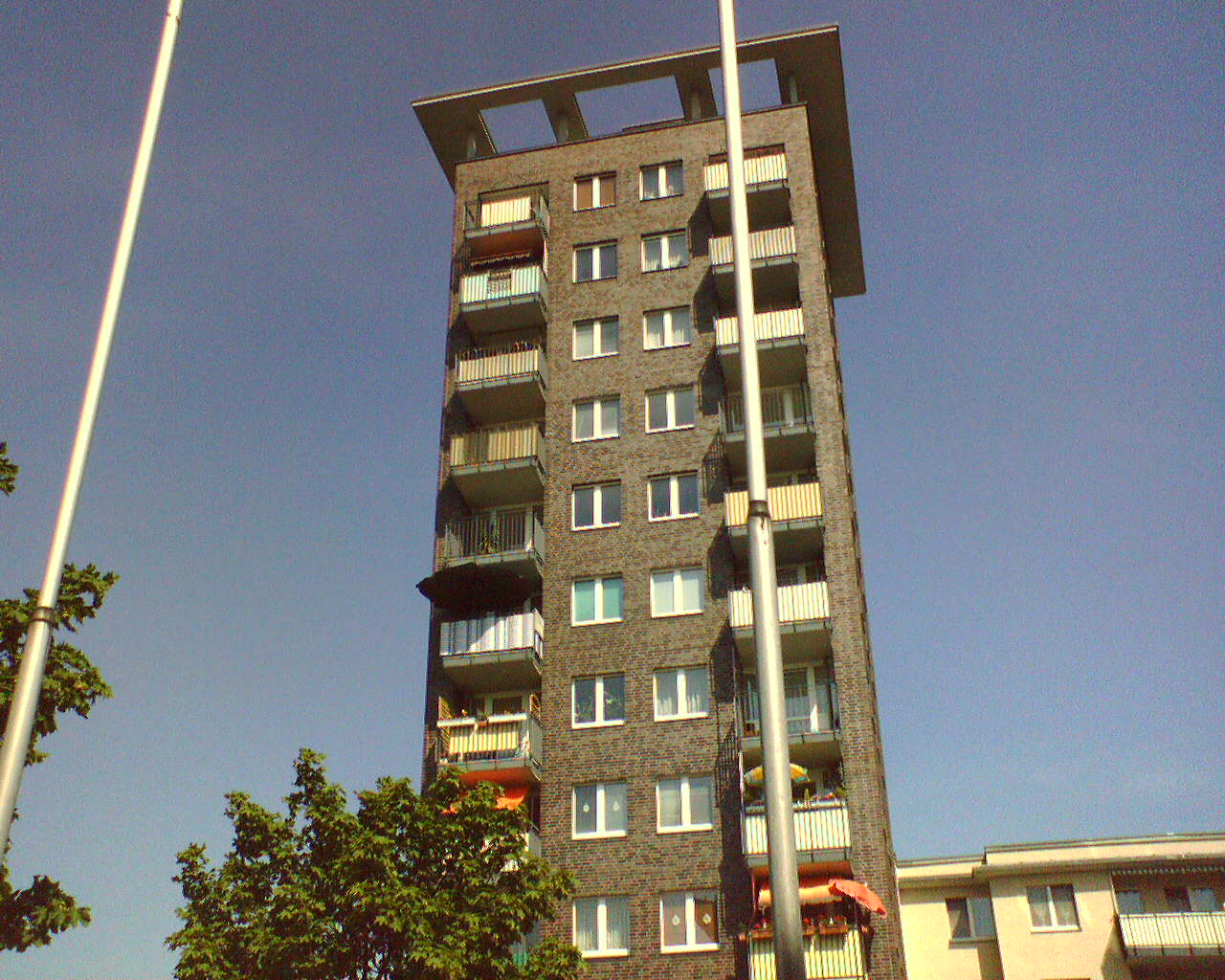 Altglienicke, Kölner Viertel, Hochhaus Ehrenfelder Platz